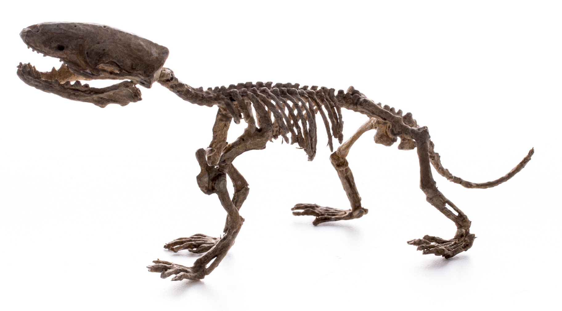 Zhangheoterio. Replica.